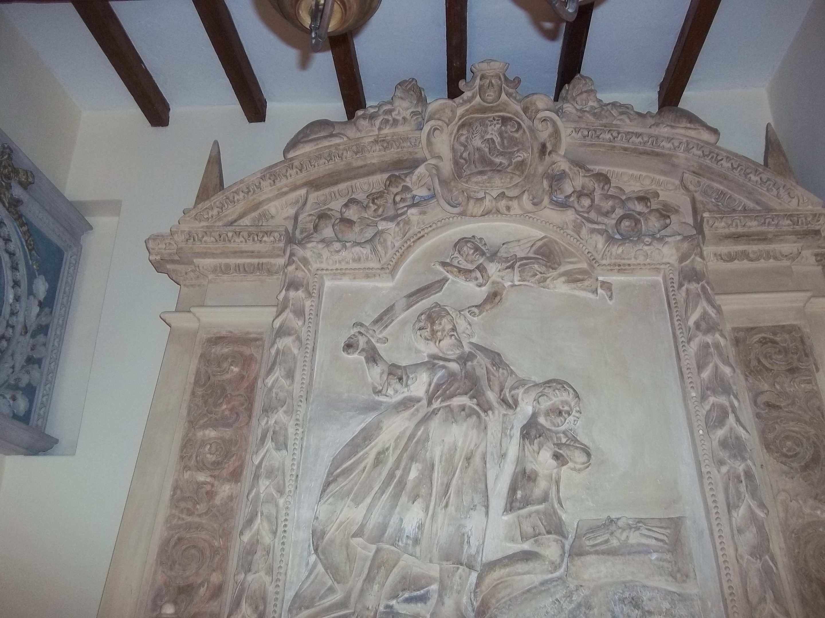 המוזיאון העברי על-שם פאוסו לוי ובית הכנסת בעיר סריאנה